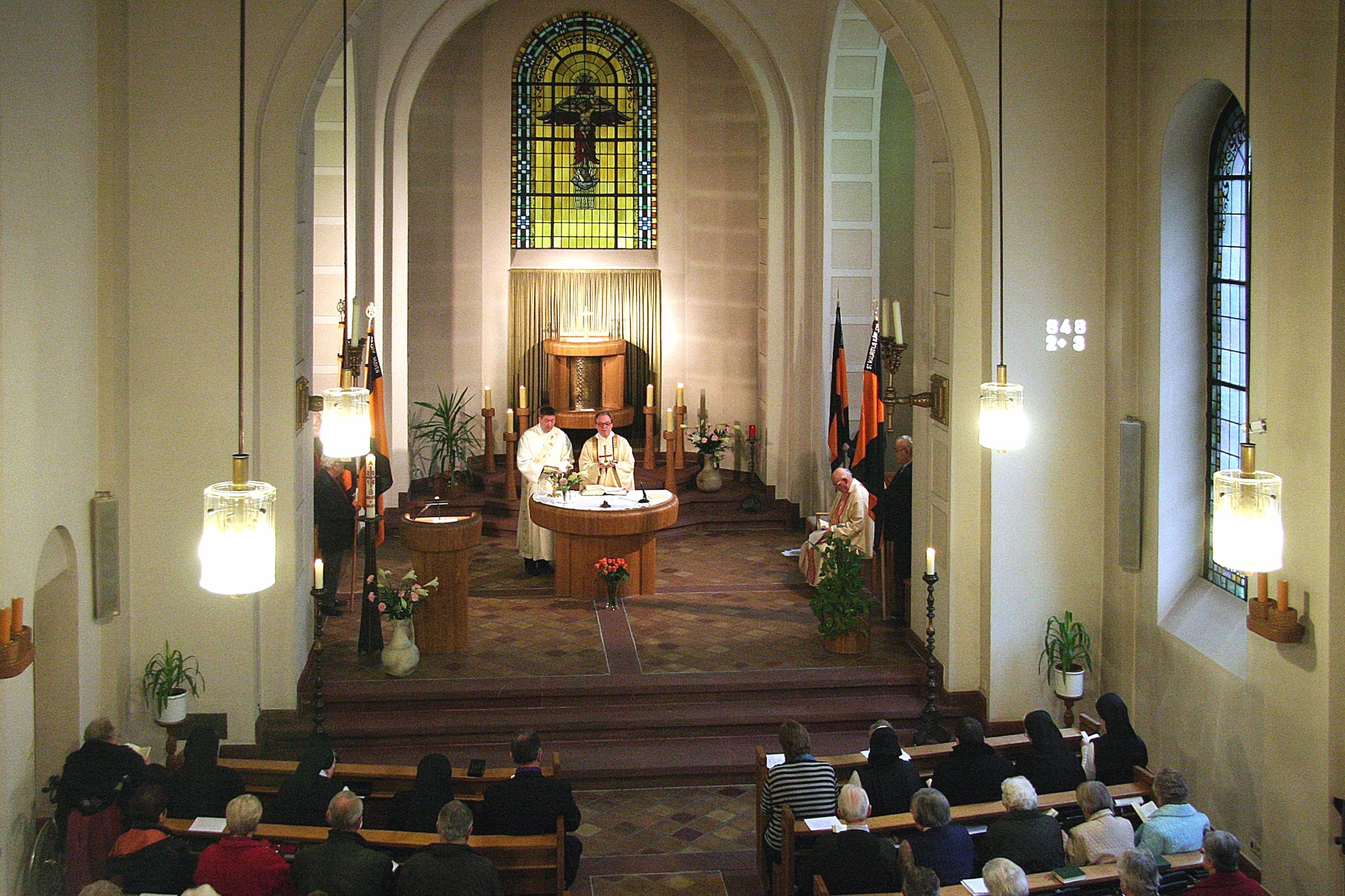 Gottesdienst in der Kapelle des ehemaligen Klosters Helgoland bei Mayen. Zelebrant: Thomas Gerber, Präses des Kopingwerks Diözesanverband Trier